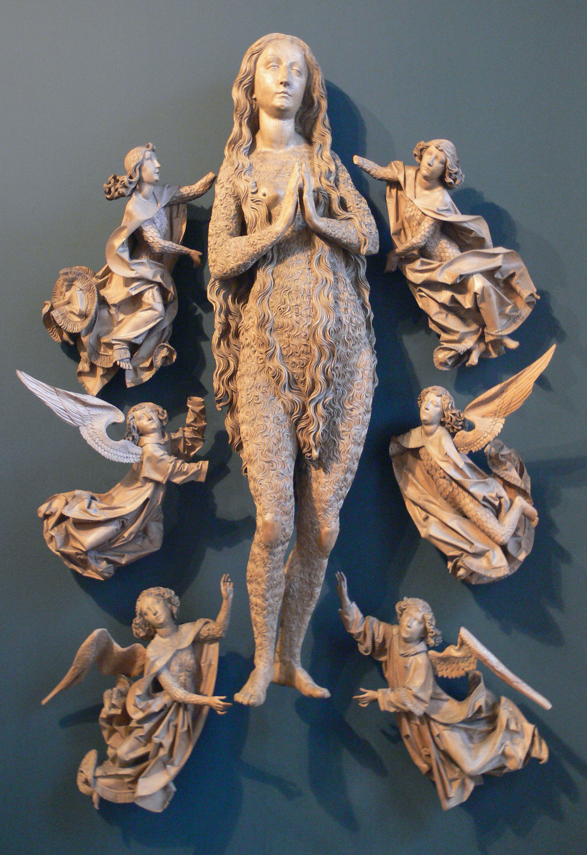 Heilige Magdalena von Engeln erhoben, aus dem Hochaltar von Münnerstadt, 1490/1492, Einzelteile aus dem Ensemble, 1756 von Münnerstadt entfernt. Bayerisches Nationalmuseum, München